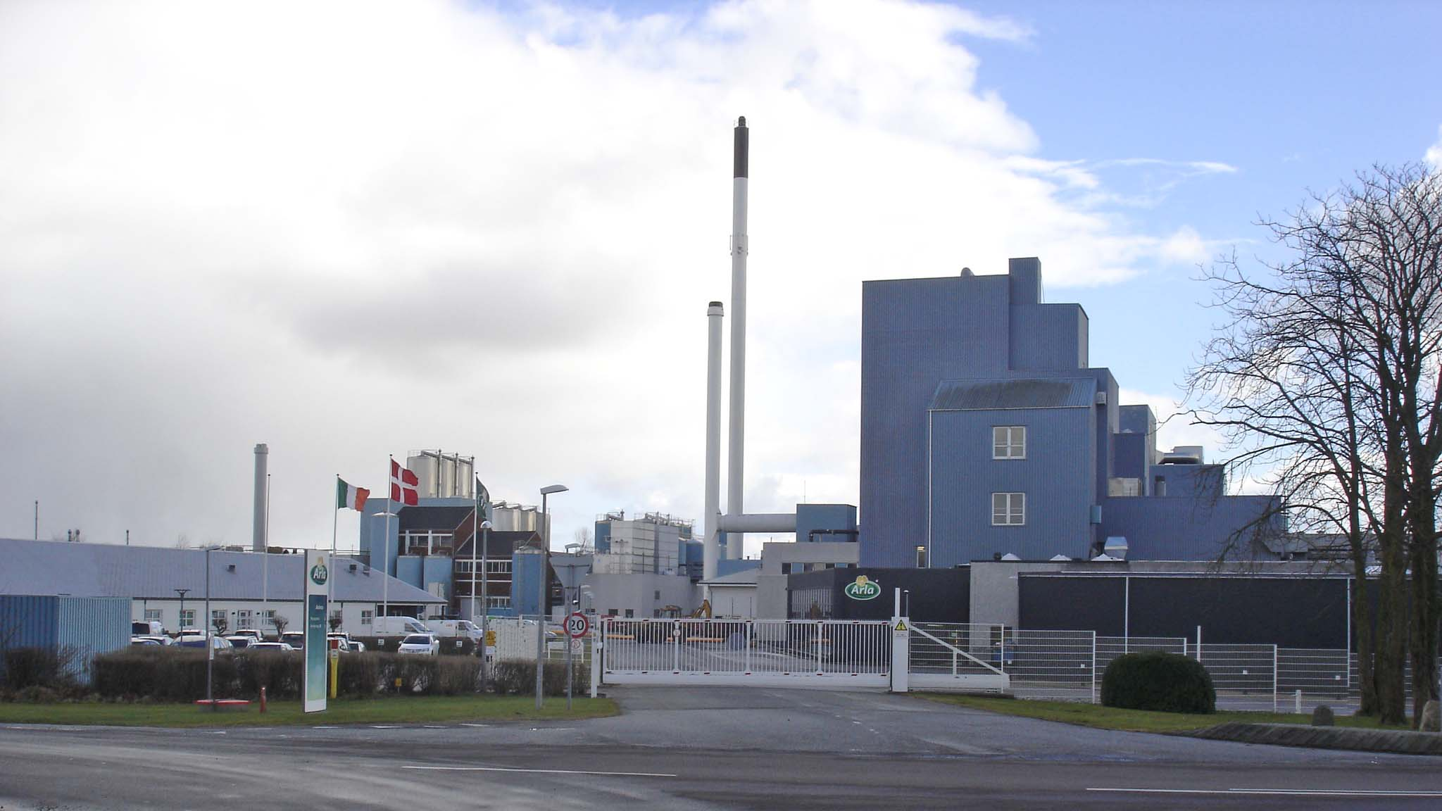 Arla Foods Arinco i Videbæk